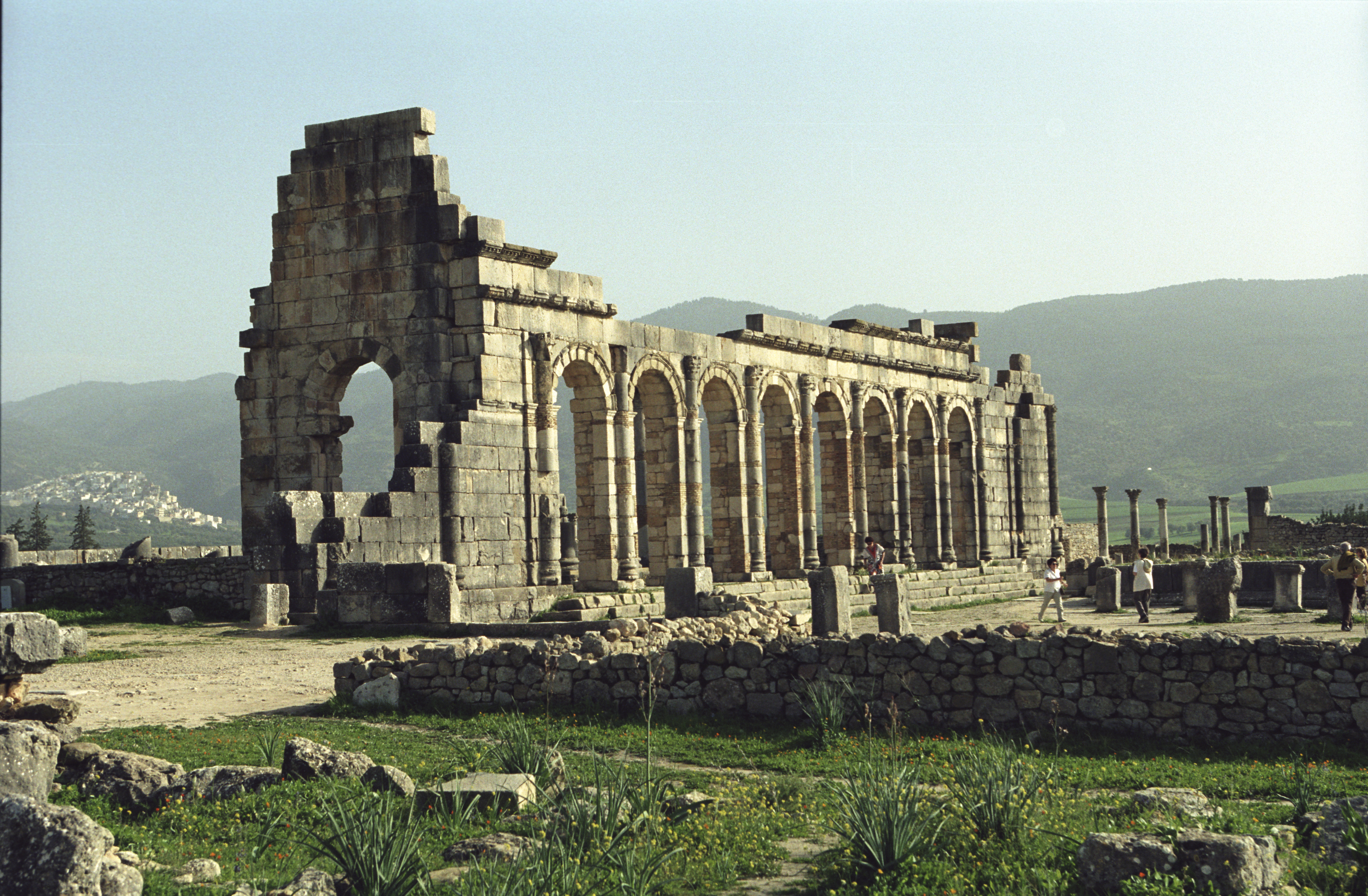 Volubilis, Marocco